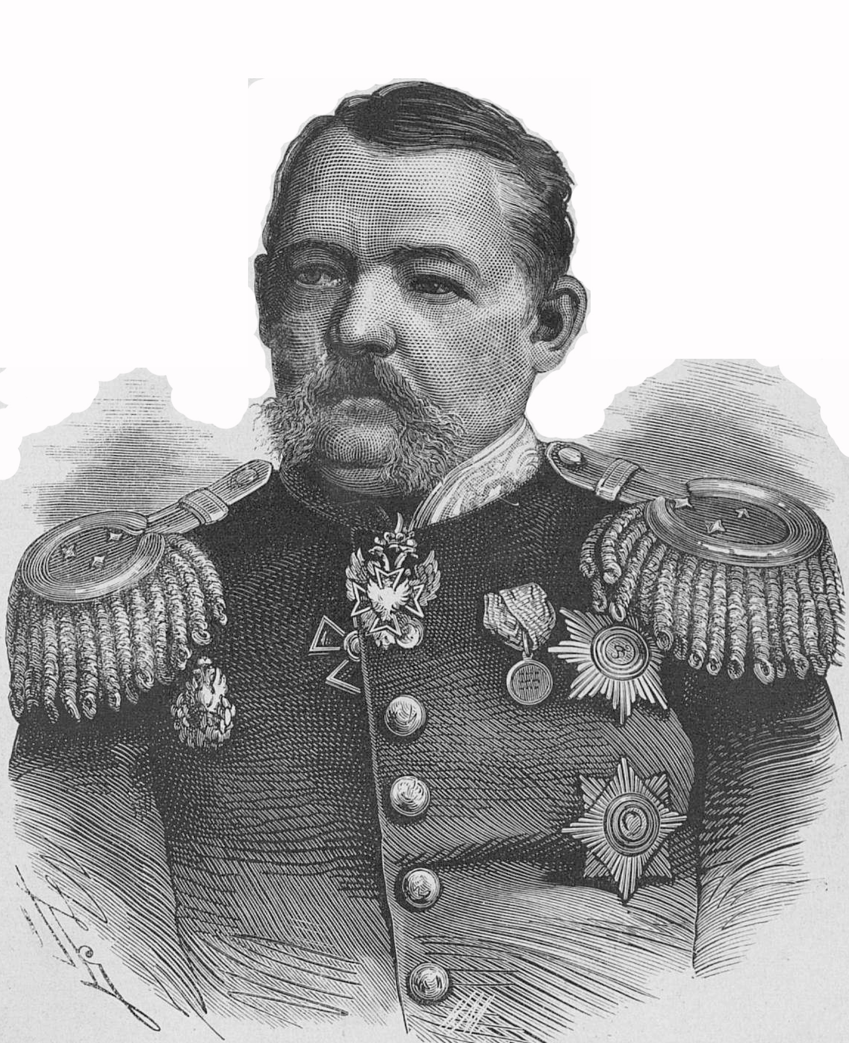 Доктор Козлов Николай Илларионович, 1877 год. Данный рисунок был также использован для иллюстрирования статьи «Козлов, Николай Илларионович» опубликованной в тринадцатом томе «Военной энциклопедии», который был издан книгоиздательским товариществом Ивана Дмитриевича Сытина в 1913 году в столице Российской империи городе Санкт-Петербурге. Подробное описание к этой картинке можно прочесть в указанной статье.